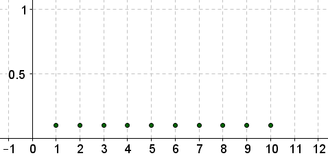 PDF од равномерна распределба со N=10